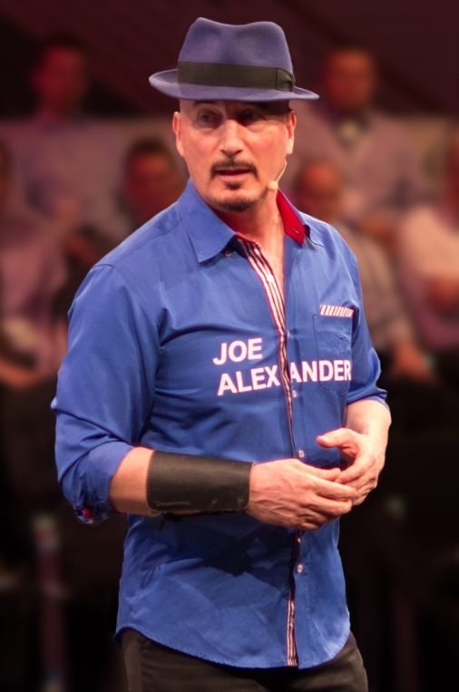 Coachingseminar mit Joe Alexander